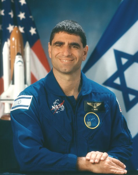 יצחק מאיו Itzhak Mayo